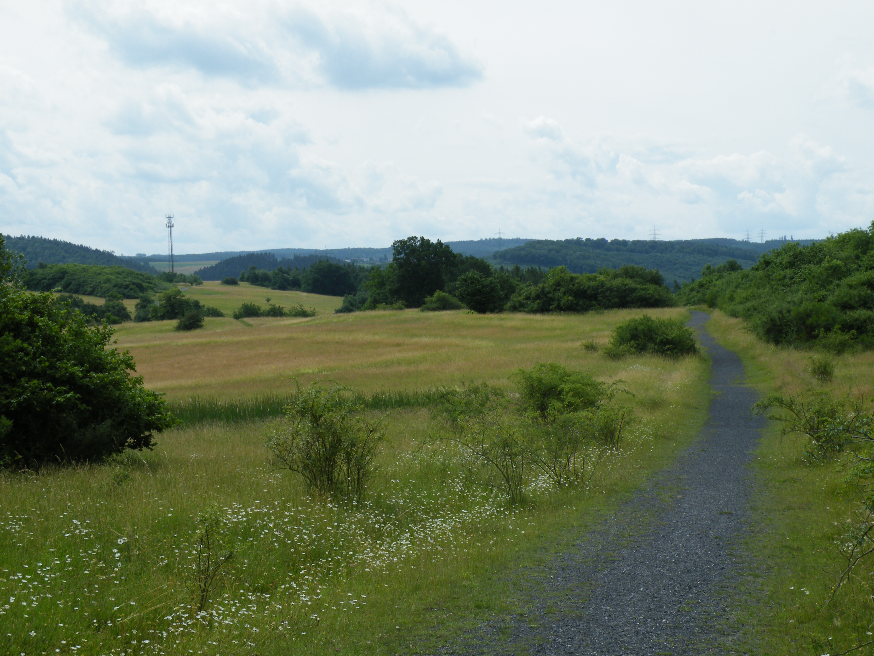 Blick von nördlichen Bereich des NSG Spreiberg nach Süden. Berge im Hintergrund gehören zum LSG Arnsberg.